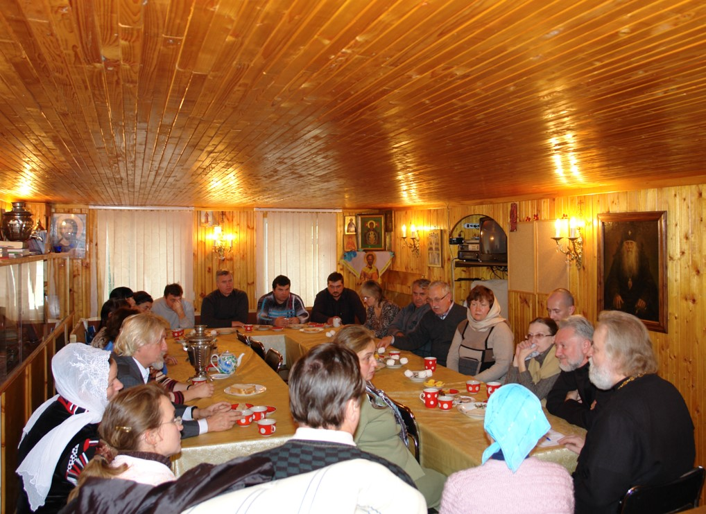 Первый приходской семейный клуб трезвости при Никольском храме в селе Ромашково Одинцовского района Московской области, руководитель - протоиерей Алексий Бабурин, 2004 год